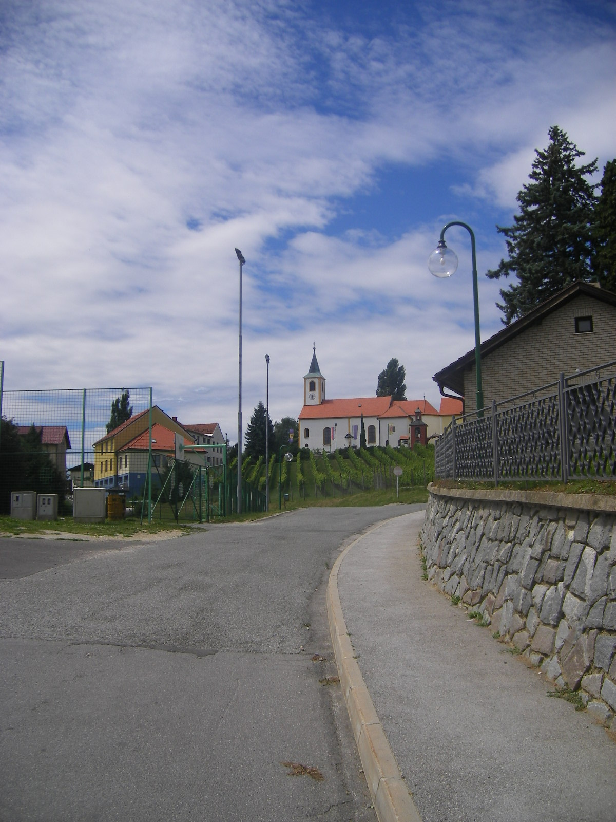 Zgornja Korena (municipality Duplek)